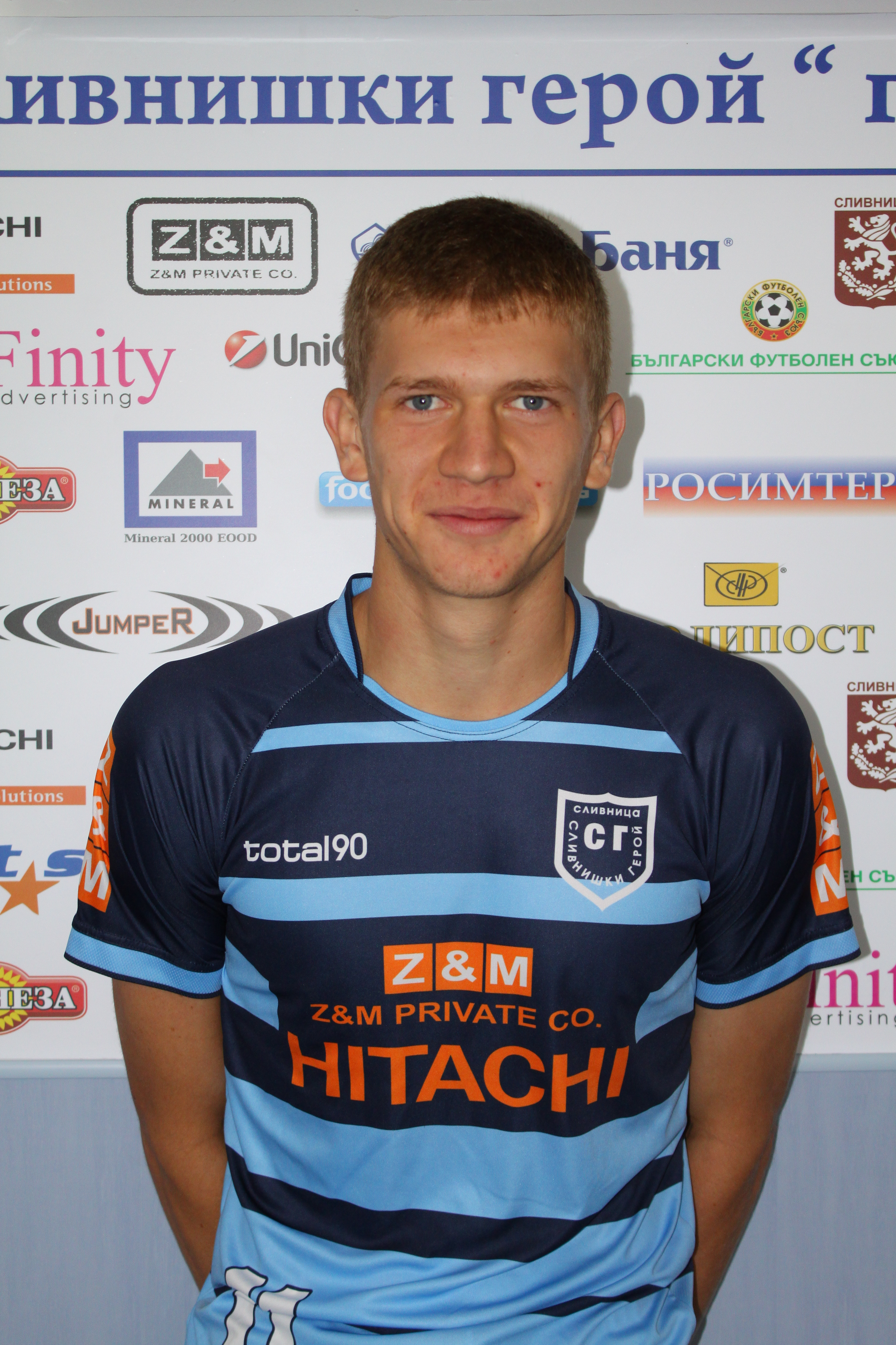 Светослав диков - български футболист, състезател на Сливнишки герой